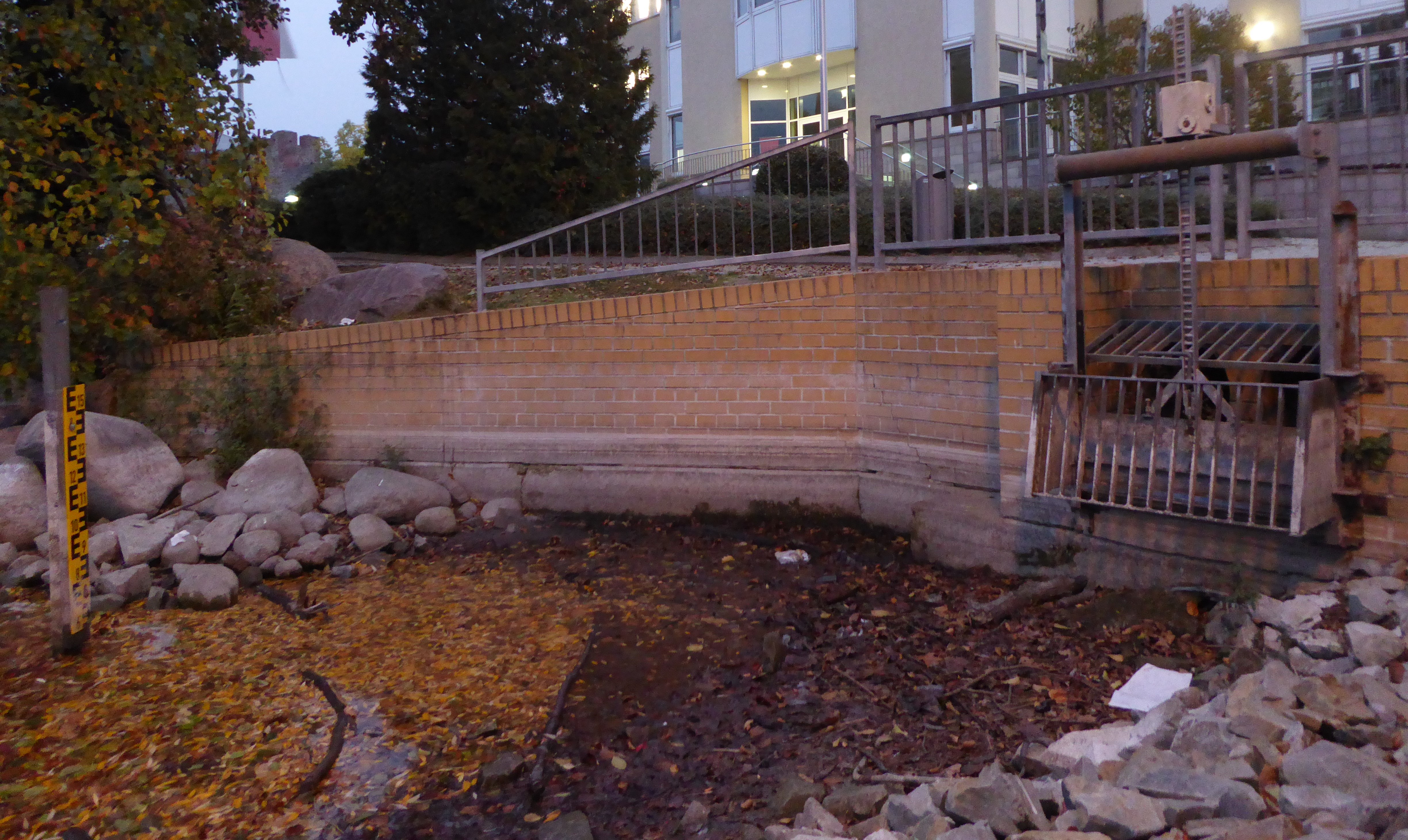 Strausseeablauf und Pegelmesser